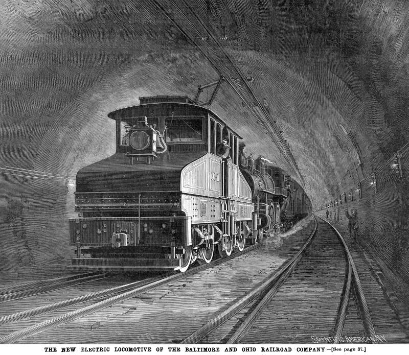 B & O electric locomotive, 1895